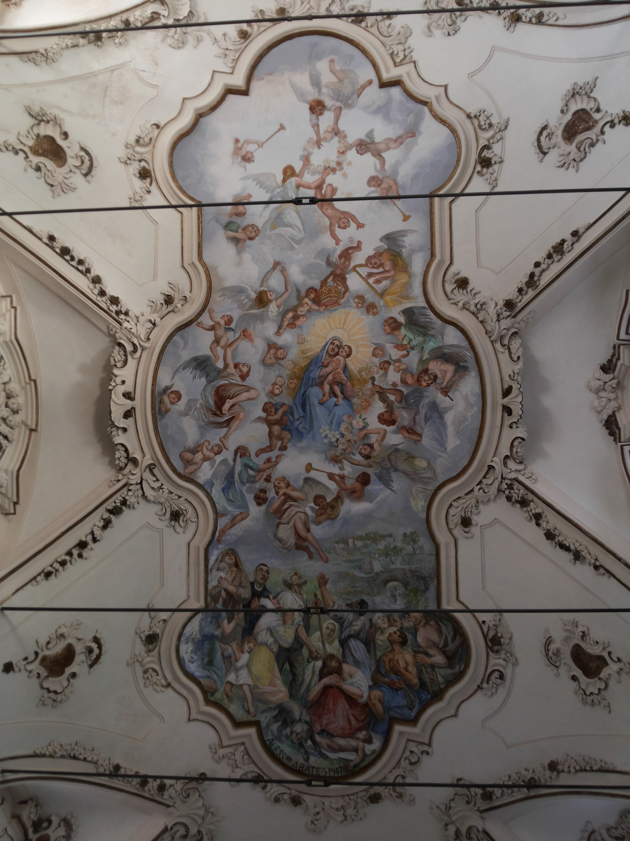 Madonna con Gesù Bambino in gloria tra angeli e devoti; affresco di Alessandro Abate (1947), Santuario della Madonna dei Miracoli (Alcamo)